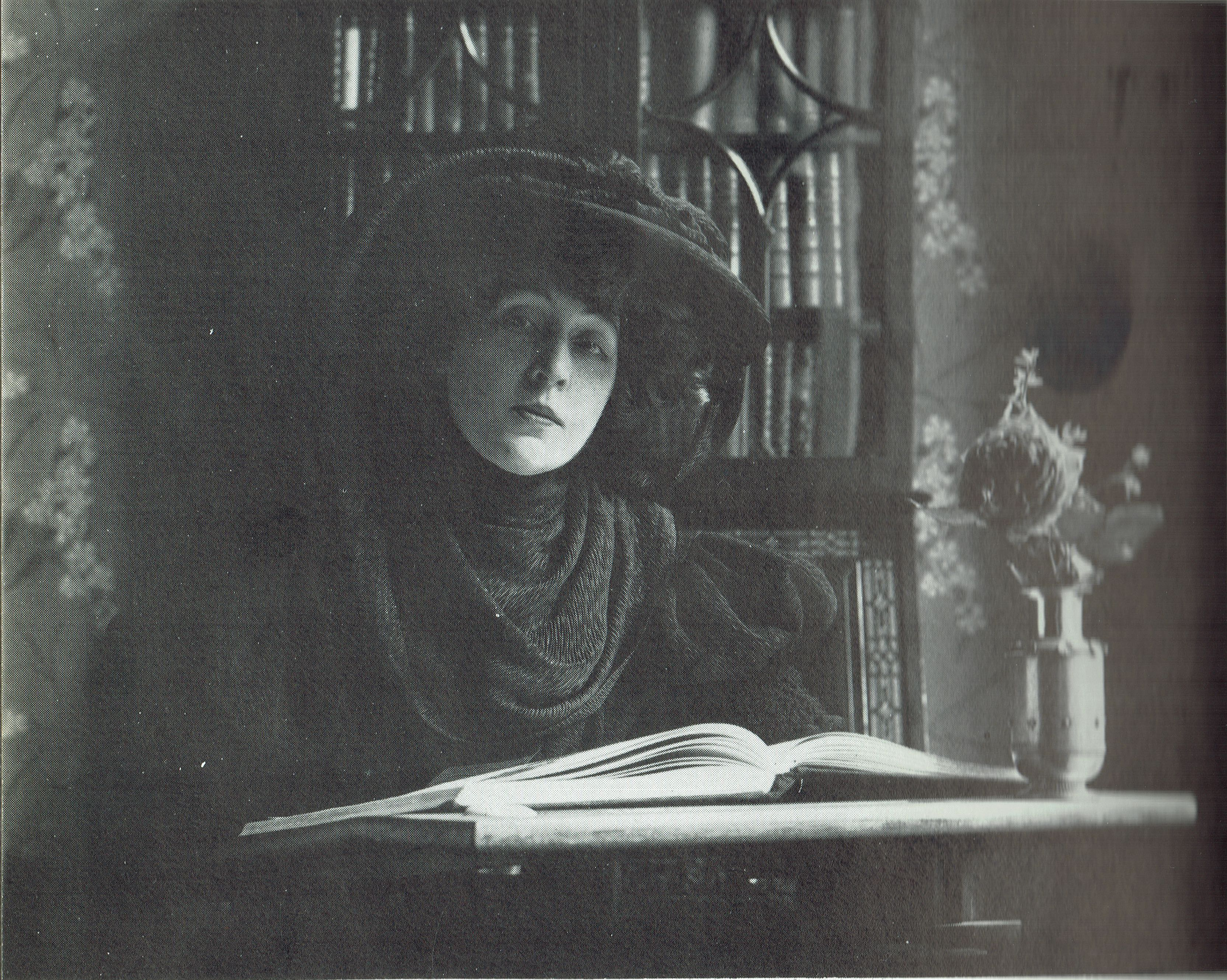 Portrait de Rosemonde Gérard circa 1900 …